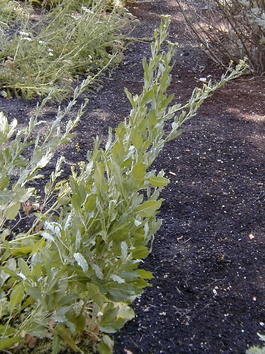 Tanacetum balsamita. Real Jardín Botánico de Madrid